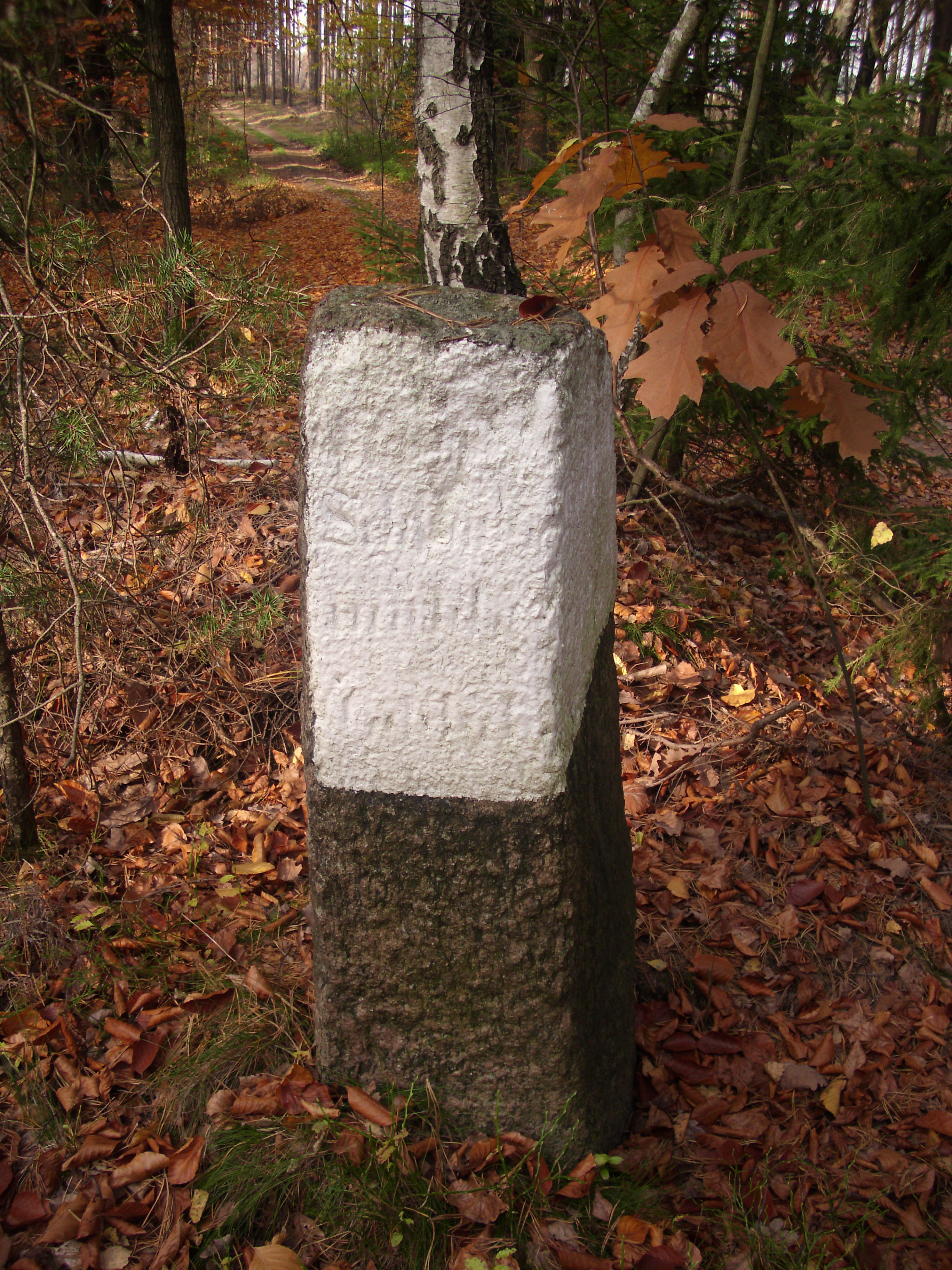 Wegestein am Mahlweg zur Schlaubemühle, Naturschutzgebiet Klautzkesee und Waldmoore mit Kobbelke, Naturpark Schlaubetal, Brandenburg